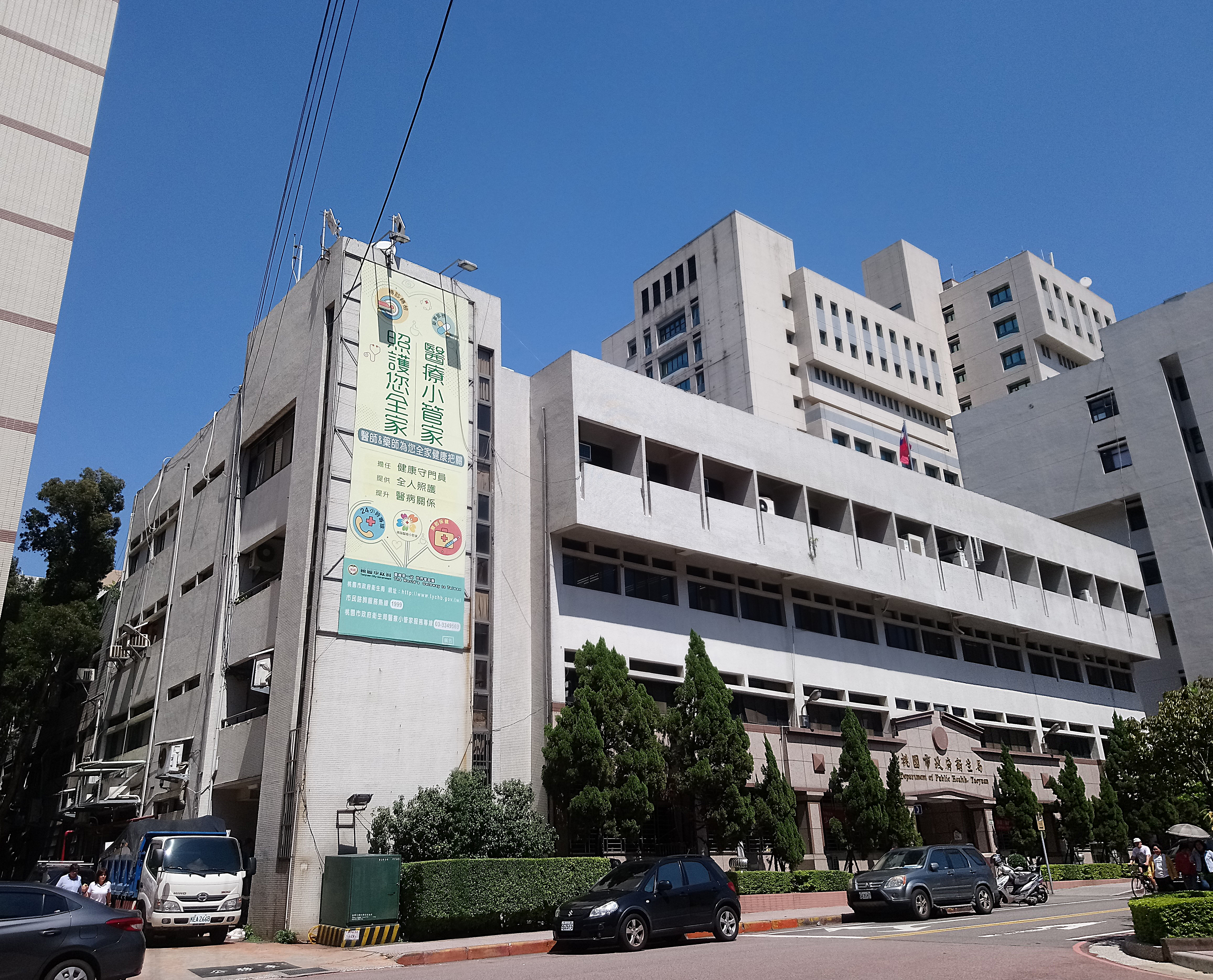 桃園市政府衛生局,桃園市桃園區市中次分區光興里